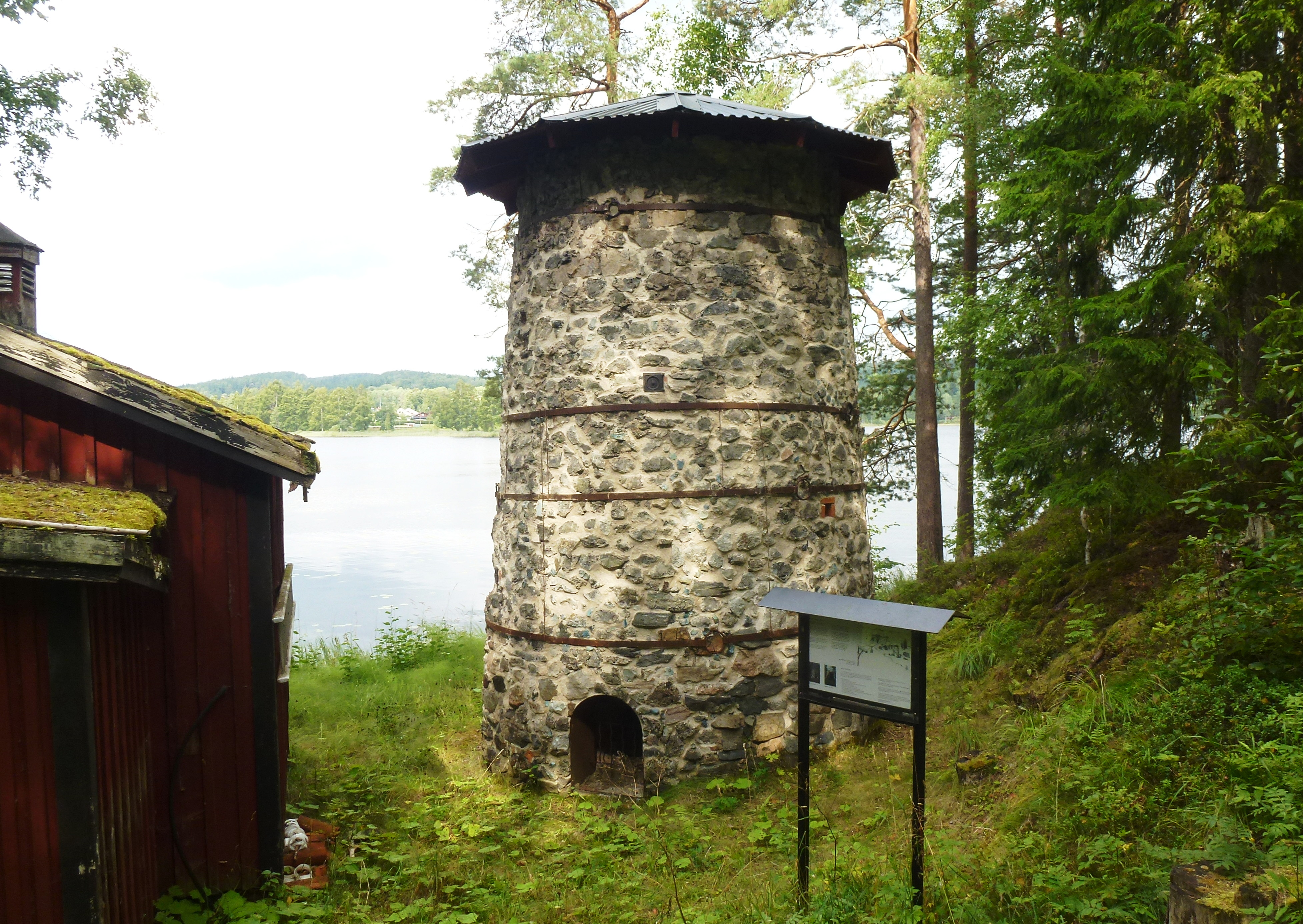 Den restaurerade kalkugnen vid Burtjärnen, Ludvika kommun